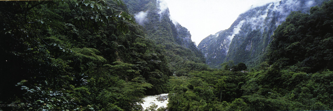 La leyenda del Muqui, está ampliamente extendida en los andes peruanos, sobre todo entre los mineros. Licensing Fotografía tomada por Ari, licenciada bajo . --Ari 04:07 16 feb 2006 (CET)